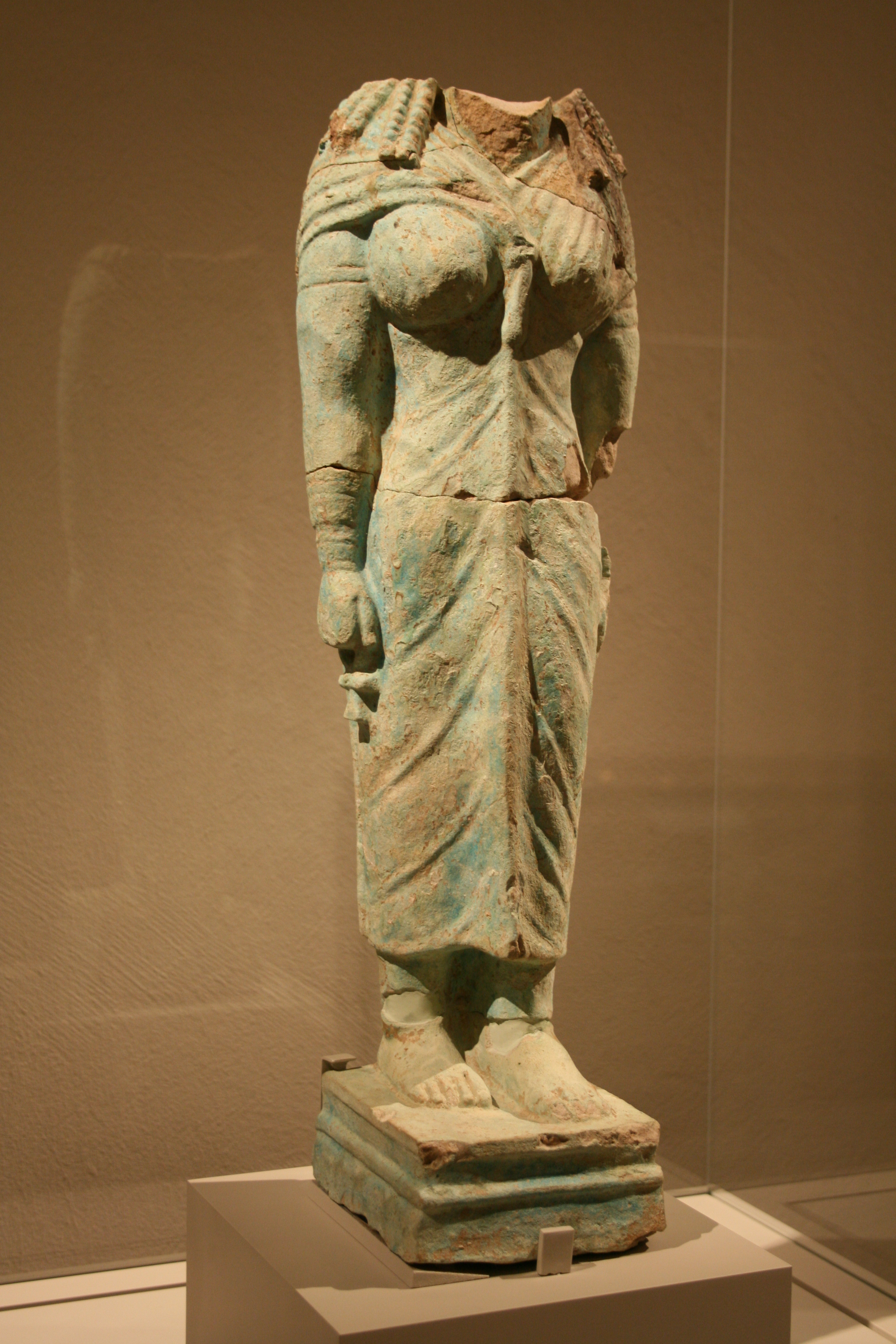 Göttin Isis aus Naga (heute: Ägyptisches Museum Berlin, Inv. Nr. KA)